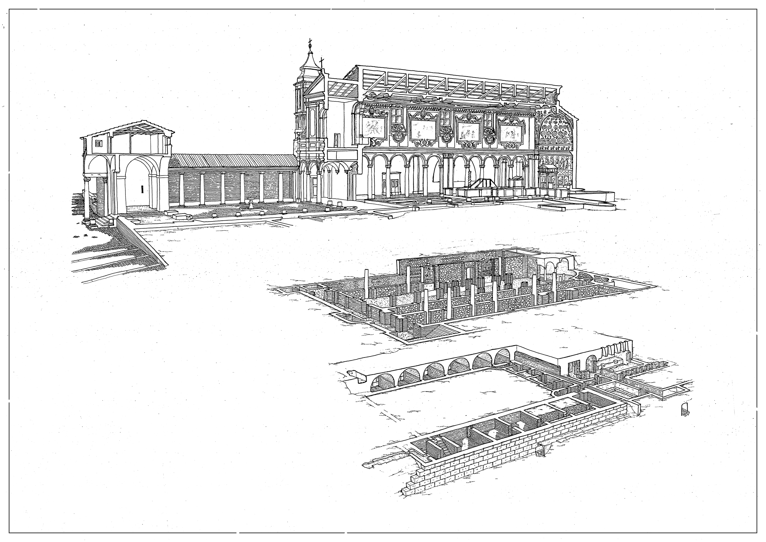 Basilica di S. Clemente, Roma_Esploso prospettico dei tre livelli